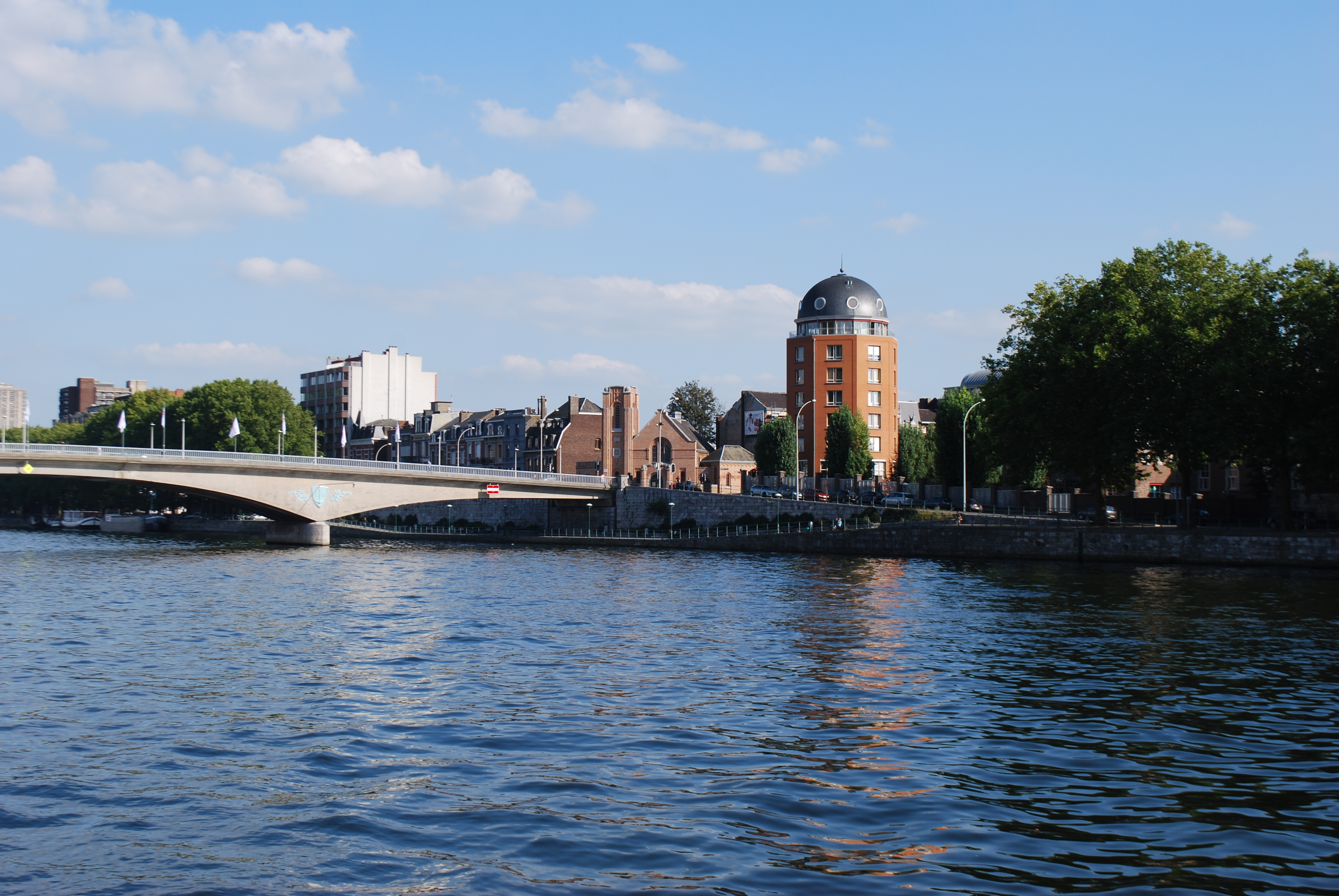 Vue du pont Maghin et du quai Sainte-Barbe à Liège.